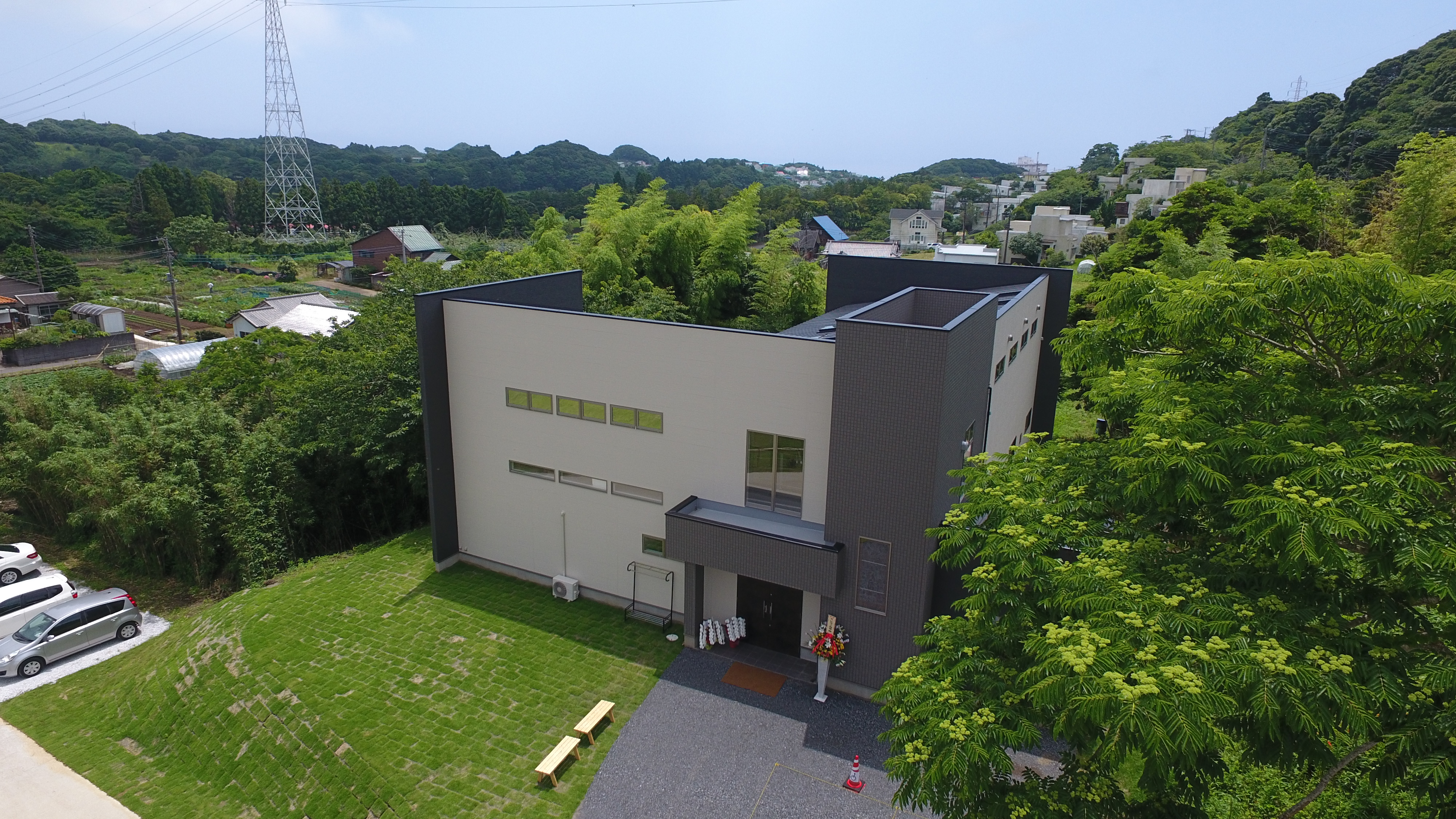 SGT美術館